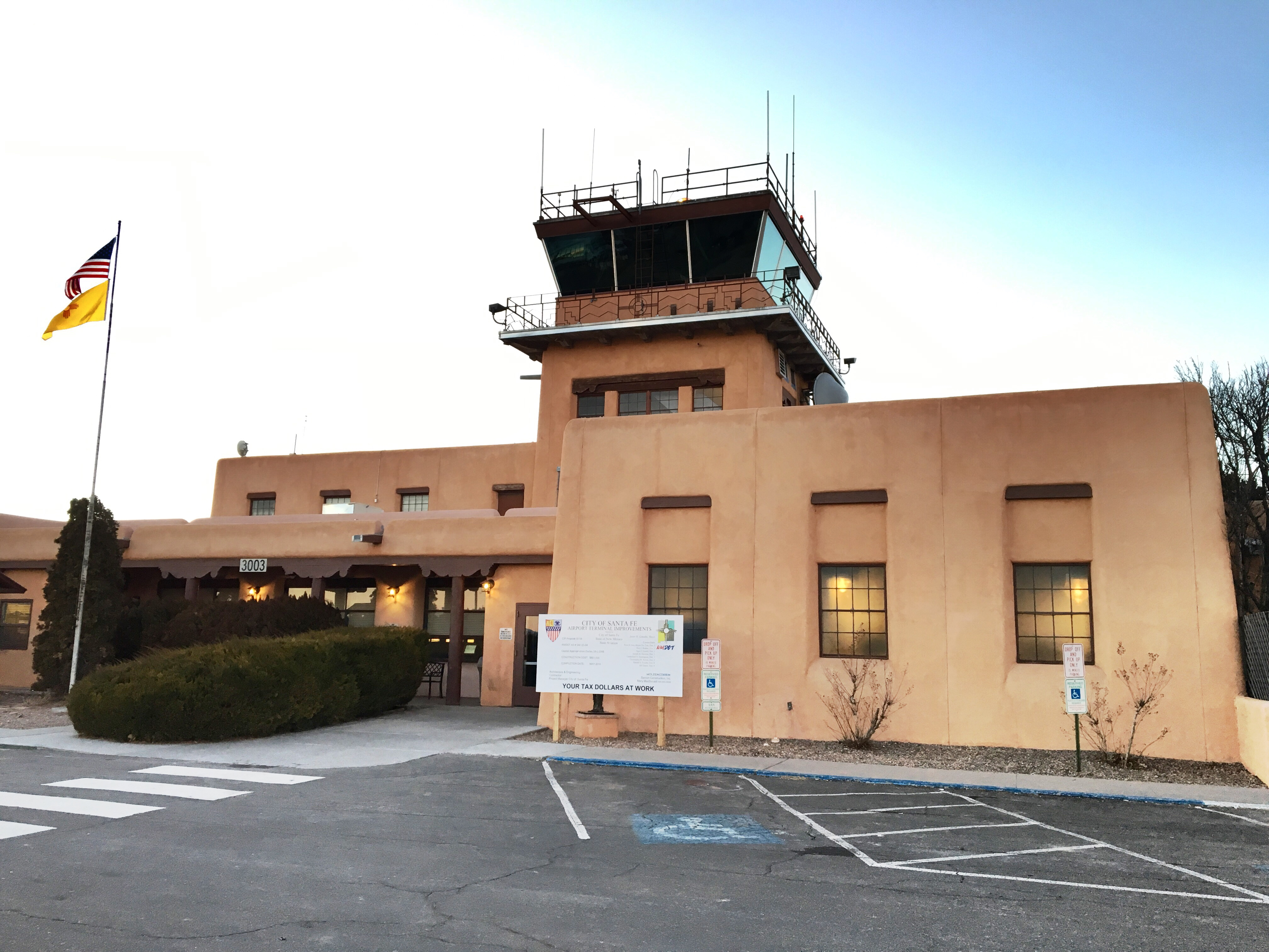 Santa Fe Municipal airport